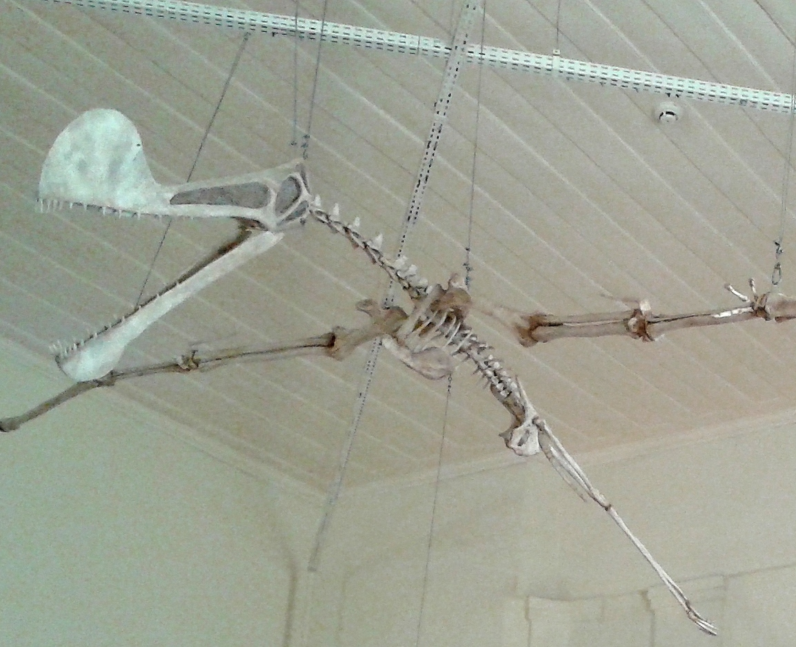 Classification: Pterosauria, Anhangueridae